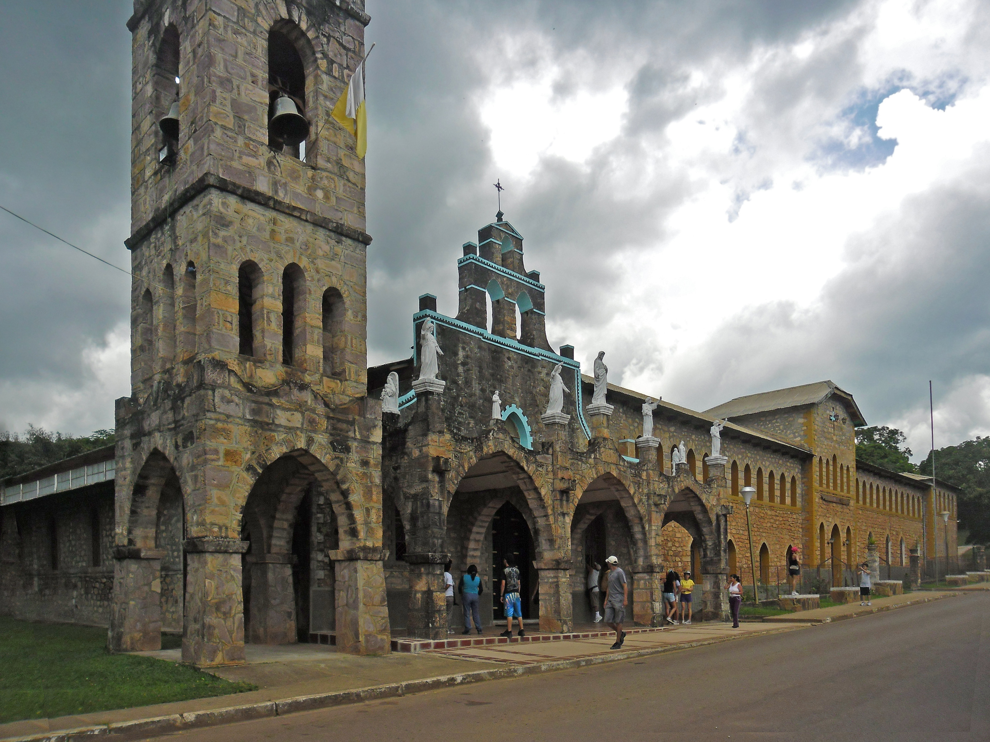 Catedral en Santa Elena de Uairen